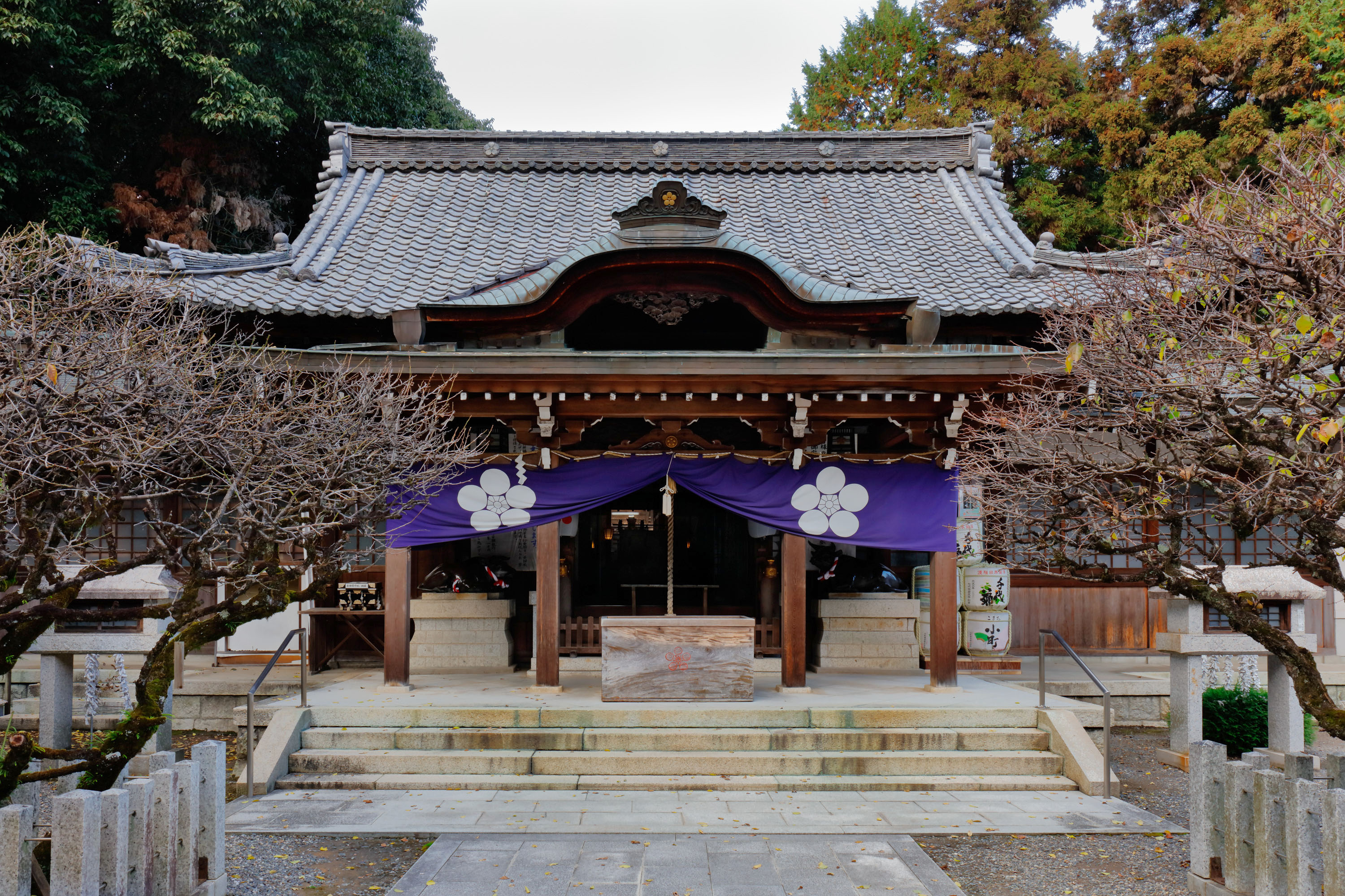 長良天神神社 (岐阜市)-拝殿